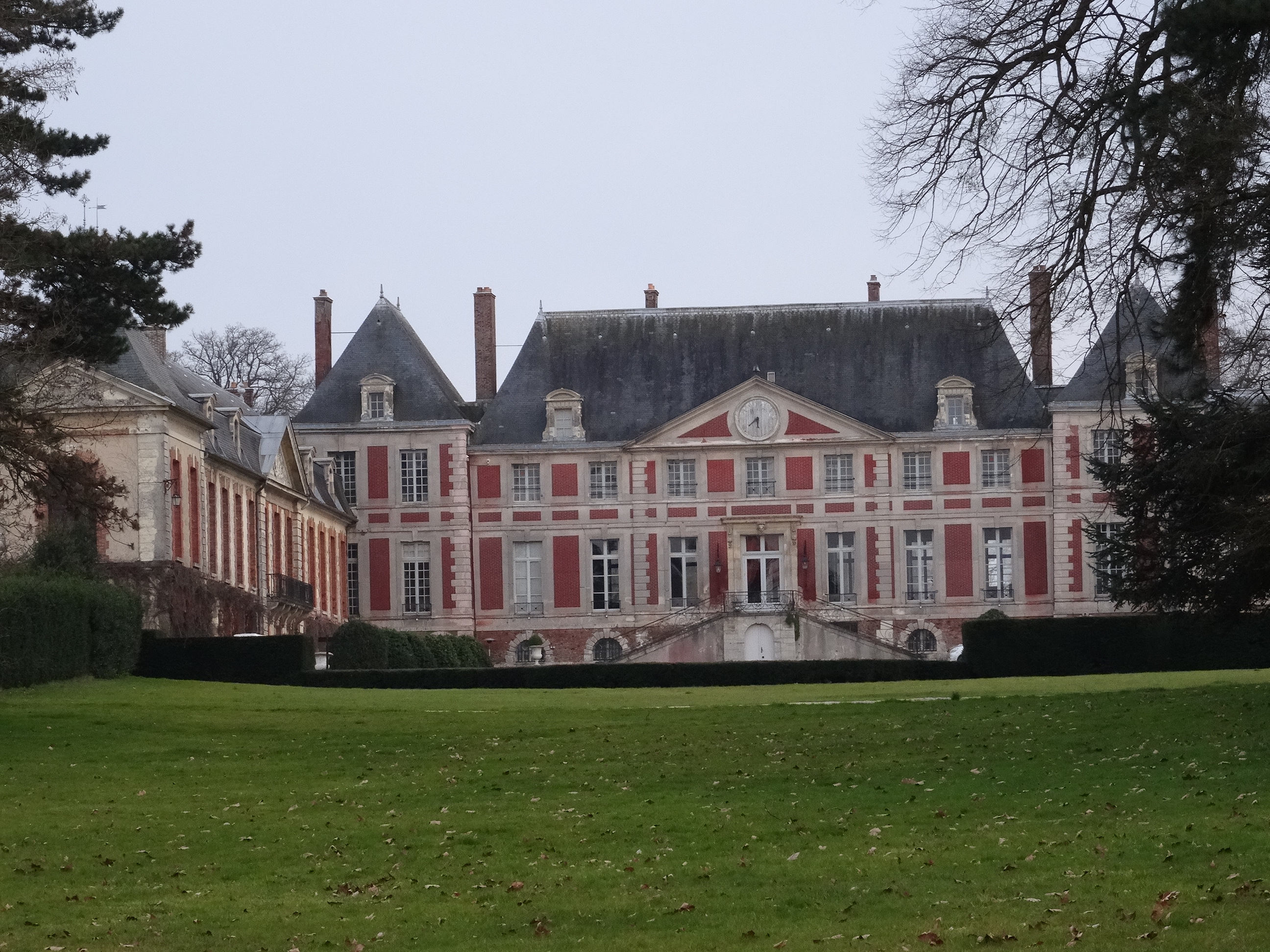 Château de Guermantes. (Seine-et-Marne, région Île-de-France).